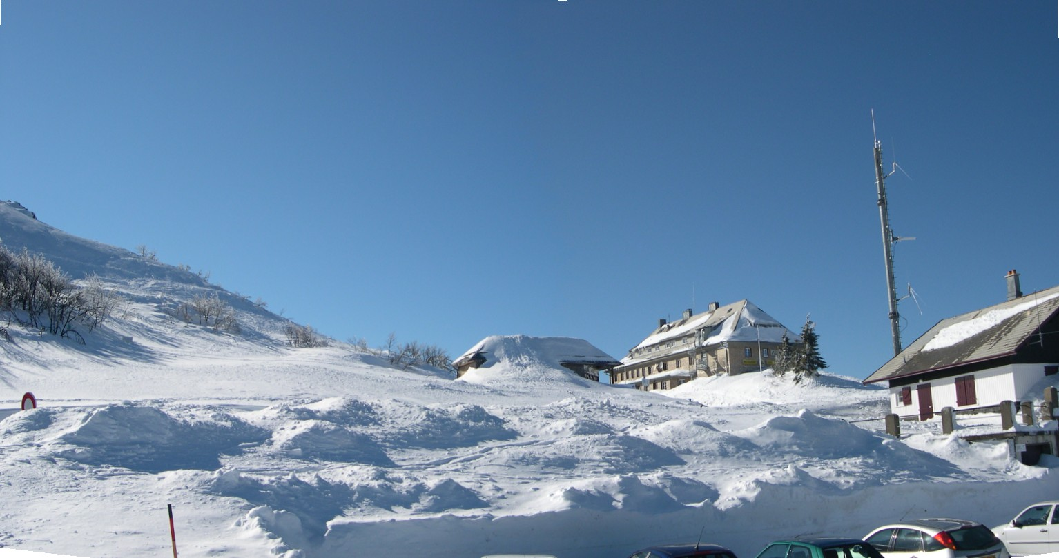 Le Grand Ballon,vue sur l'Hôtel alt 1350 m, massif des Vosges, 68, Alsace. Photo du 14 mars 2006.